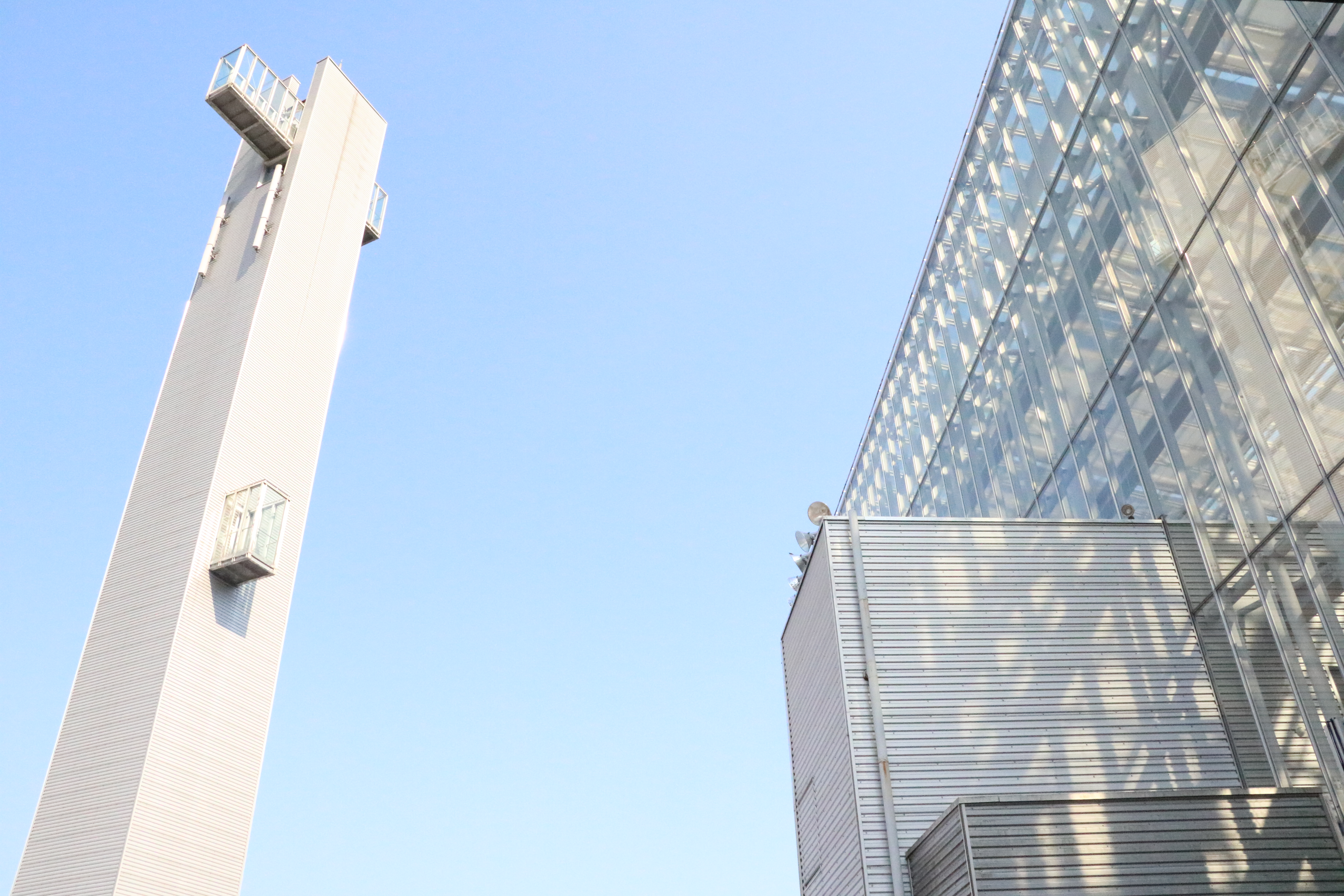 高さ約50mをほこり山国町のシンボルとなっています。